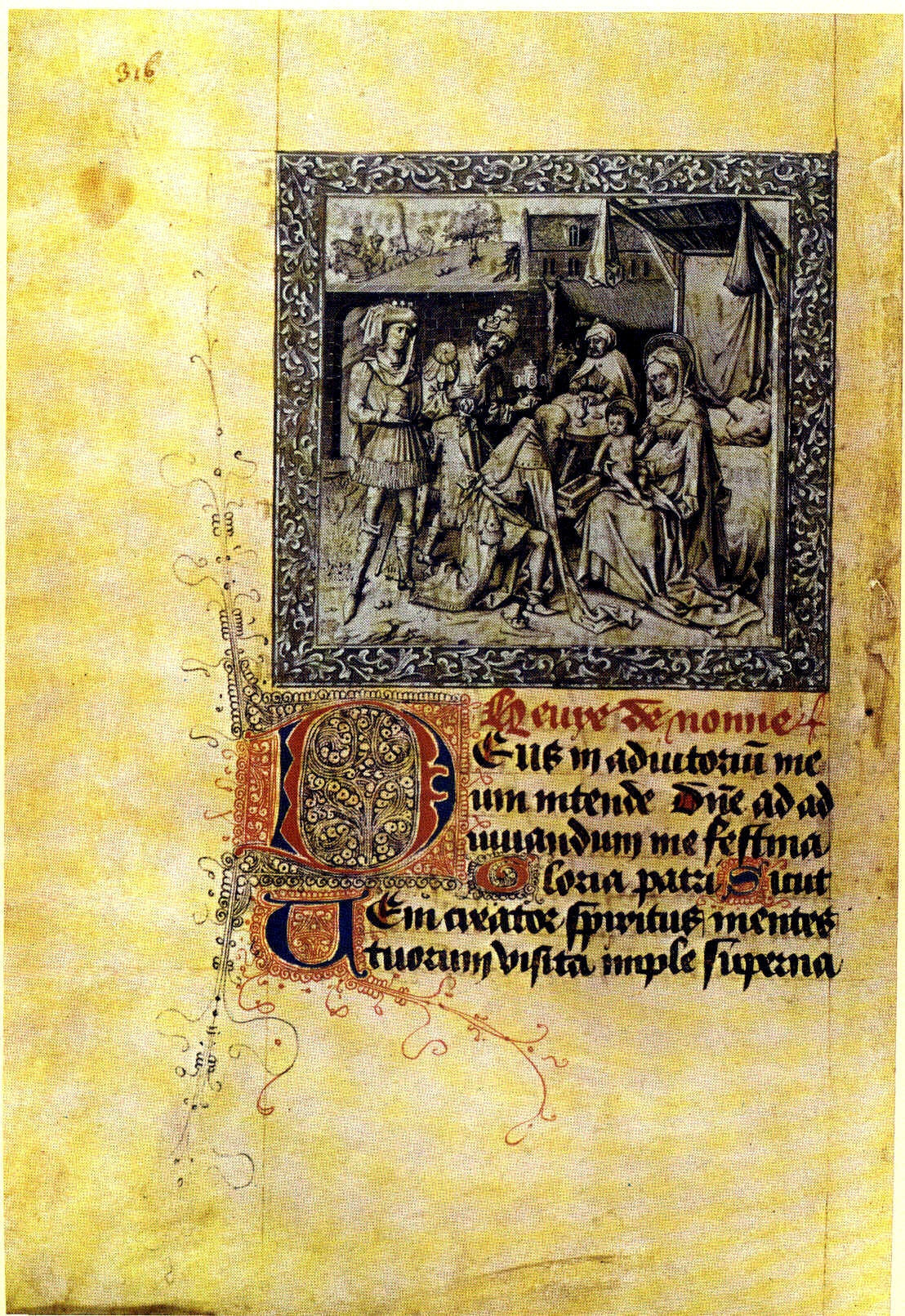 Miniatur